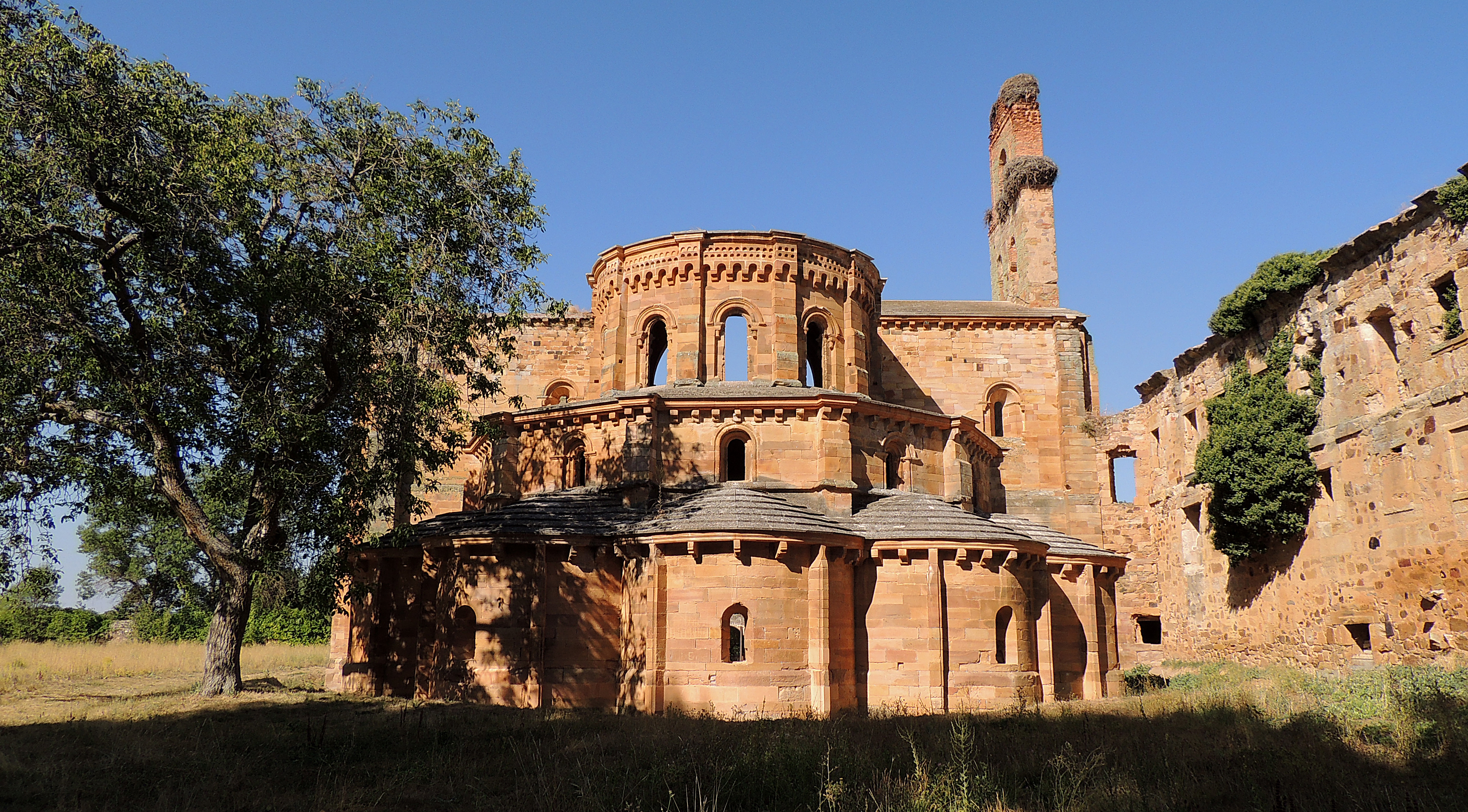 Cabecera de la iglesia del monasterio de Santa María de Moreruela